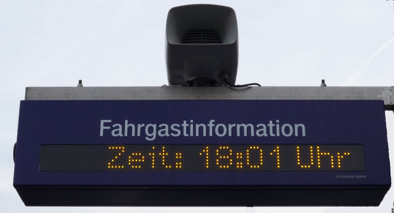 Einzeilige dynamische Fahrgastinformationen für kleinere Bahnhöfe der Deutschen Bahn AG